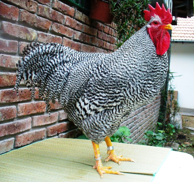 gallo bataraz barrado grueso